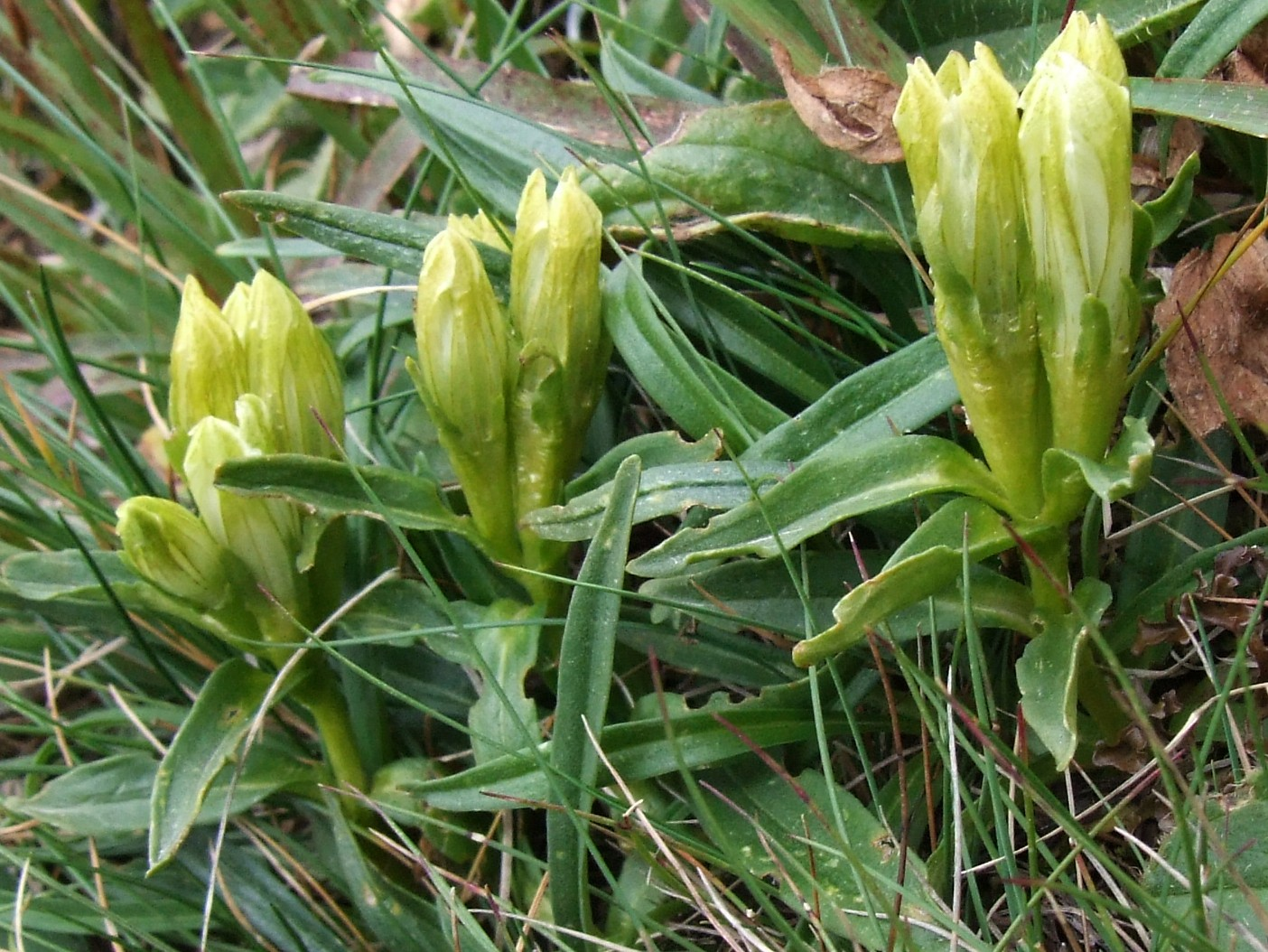 Gentiana frigida (pl. goryczka przezroczysta), habitat:West Tatra Mountains, Banikov